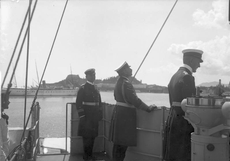 Kaiser Wilhelm II. (m.) auf der SMS "Geier" SMS "Geier" , kleiner Kreuzer, Kaiser Wilhelm II. mit Kmdt. und I.O. auf der Brücke [Kleiner geschützter Kreuzer "Geier", Stapellauf 18.101894 auf der Kaiserlichen Werft in Wilhelmshaven, bestimmt zum Einsatz in den Überseegebieten, 1914 auf Hawaii interniert, nach Kriegseintritt der USA konfiziert, in USS "Schurz" umbenannt, 1918 nach] Abgebildete Personen: Wilhelm II.: Deutsches Reich, Kaiser, II., Deutschland